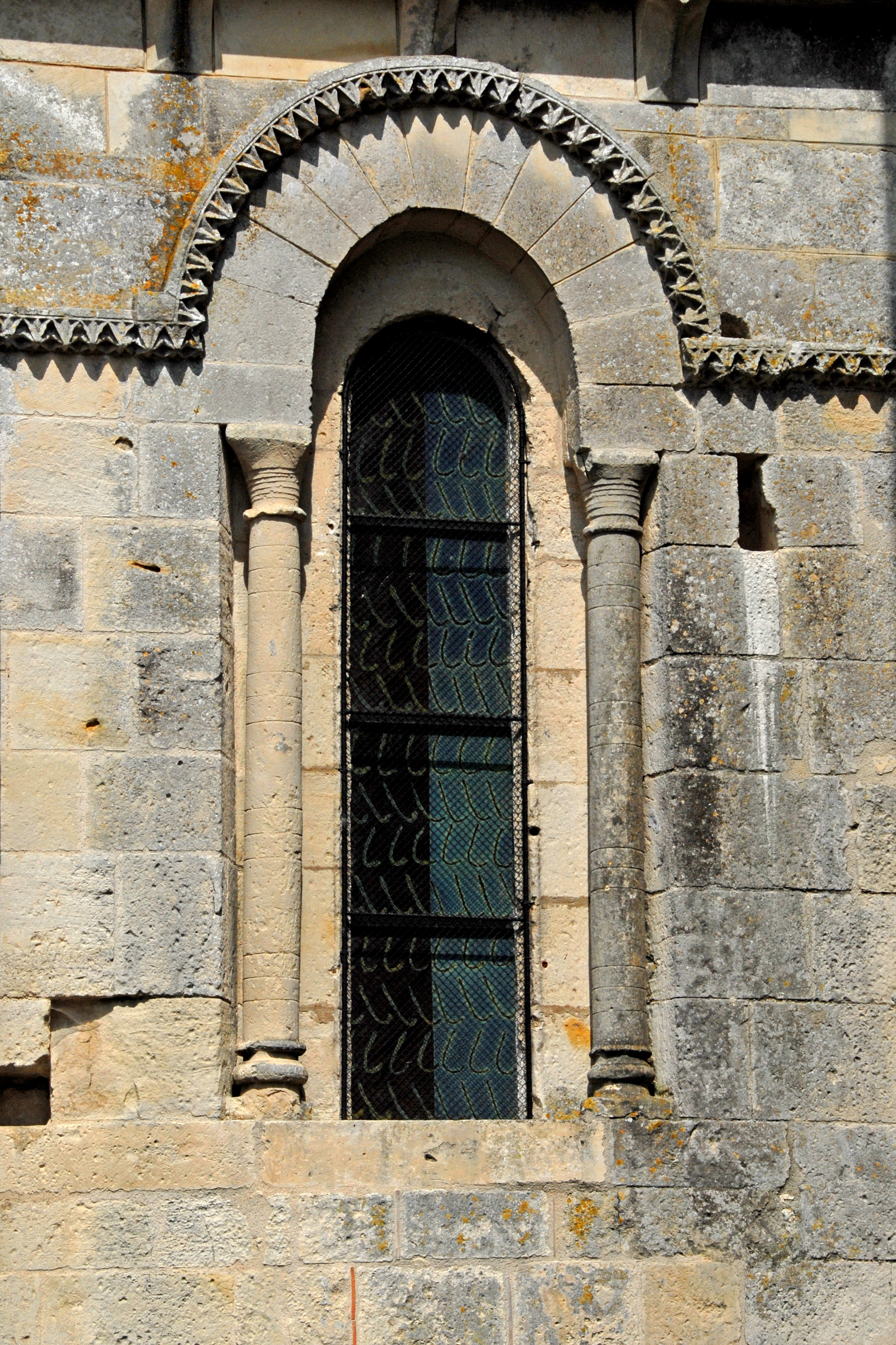 Echebrune, St.-Pierre, Fenster des Schiffs